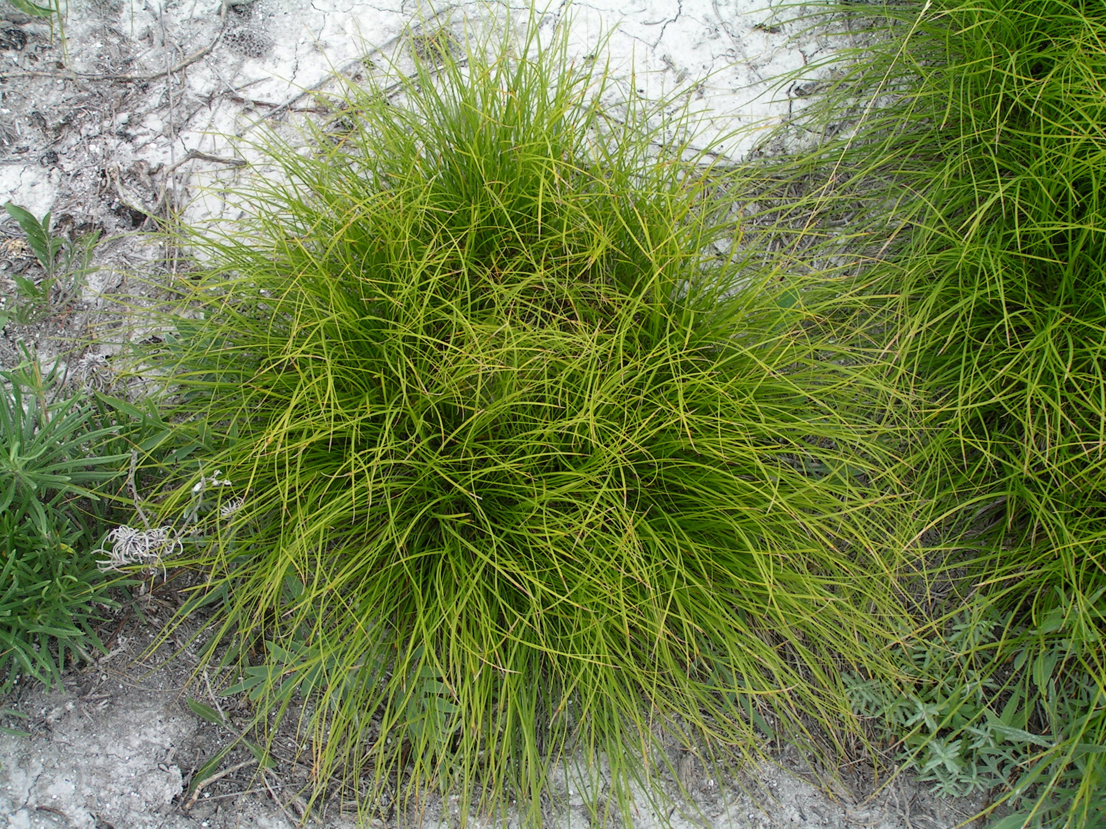 Крейдяні відслонення, Міловський район, неподалік від с. Стрільцівка